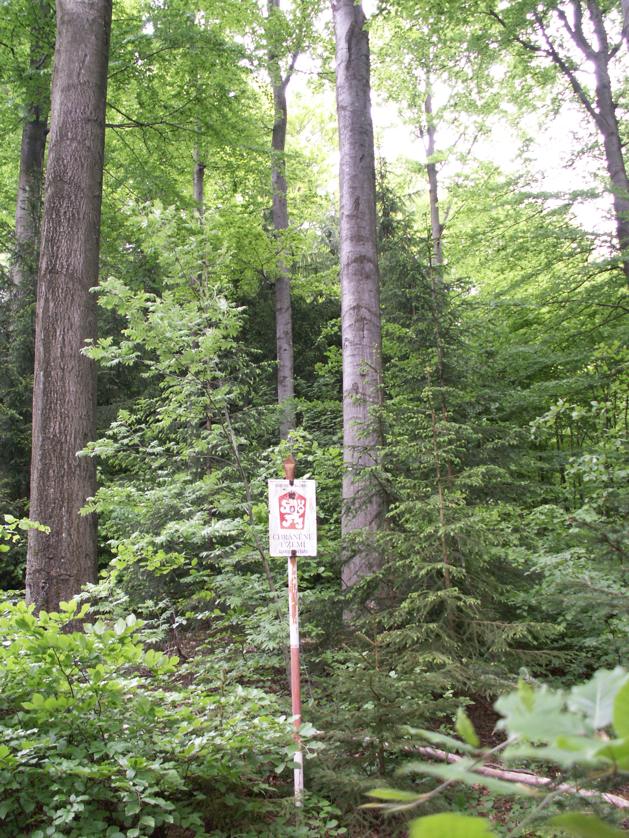 Národní přírodní rezervace Žákova hora, kóta 809,8 m n.m., okres Žďár nad Sázavou, kraj Vysočina